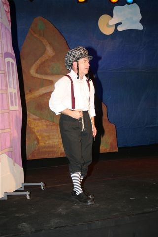 ערן בן-זאב כהרשלה